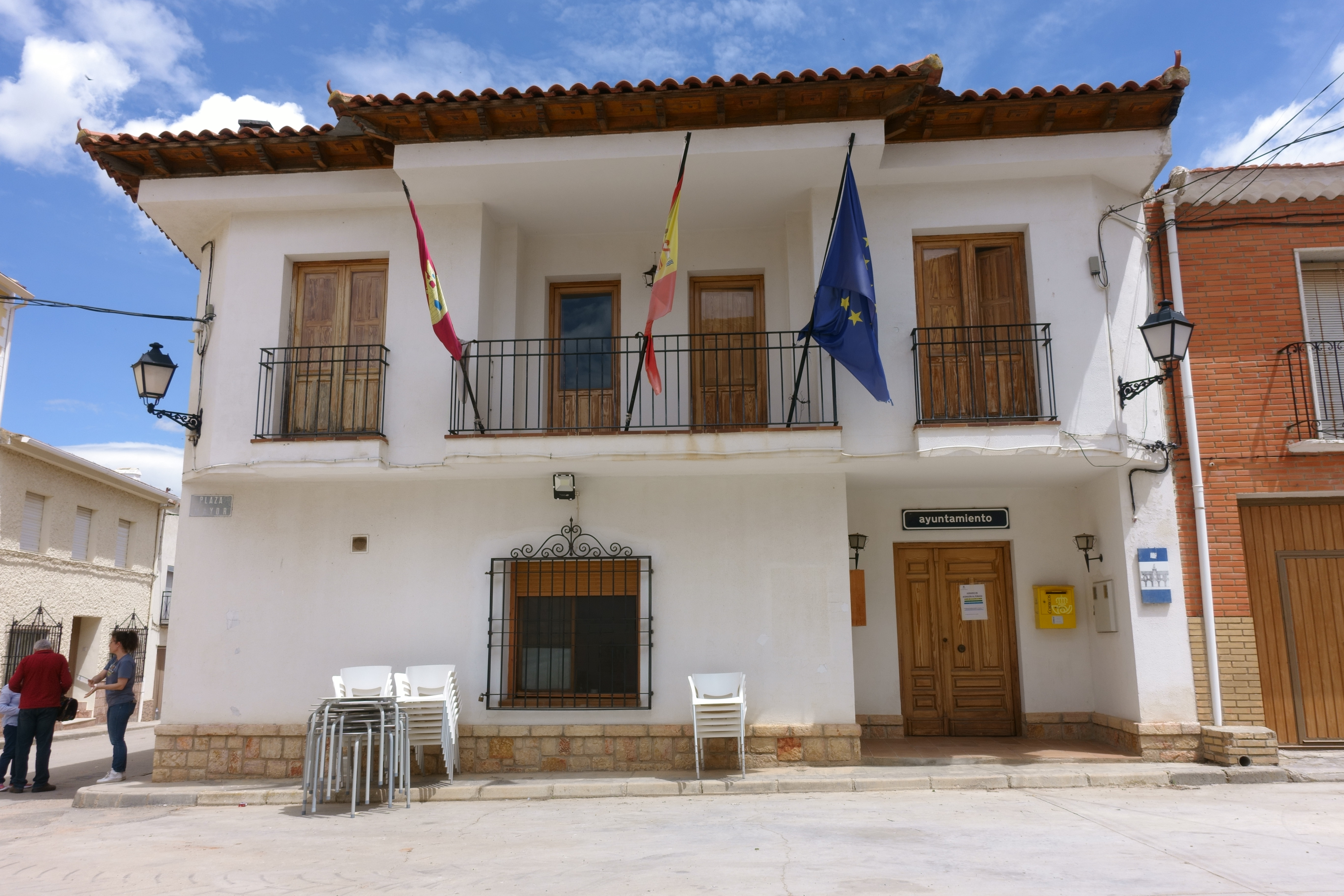 Casa consistorial de Villalgordo del Marquesado (Cuenca, España).